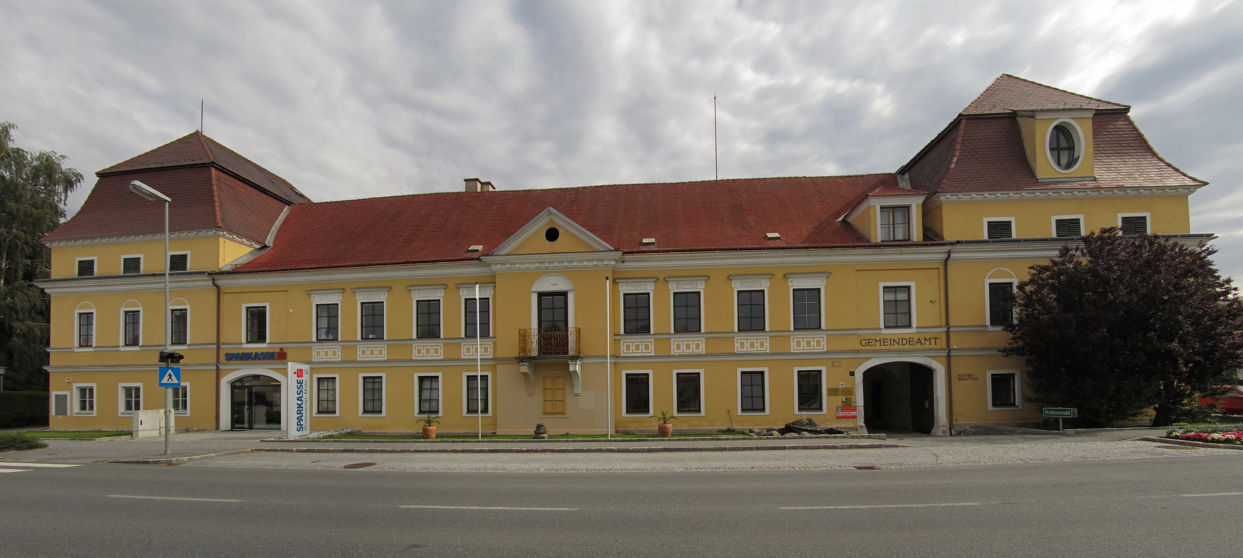 Das Schloss in Göpfritz an der Wild ist ein langgestrecktes, zweigeschoßiges Barockschloss mit Satteldach und wuchtigen, dreigeschoßigen Ecktrakten mit hohen Mansardendächern, schmalem Mittelrisalit mit Zwerchgiebel und frühhistoristischer Fassadengliederung, das in seiner heutigen Form gegen Ende des 18. Jahrhunderts erbaut wurde. Die erste urkundliche Erwähnung geht laut Dehio auf das Jahr 1454 zurück, nach anderen Quellen auf 1303.